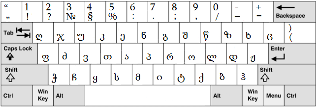 Windowsのグルジア語キーボード